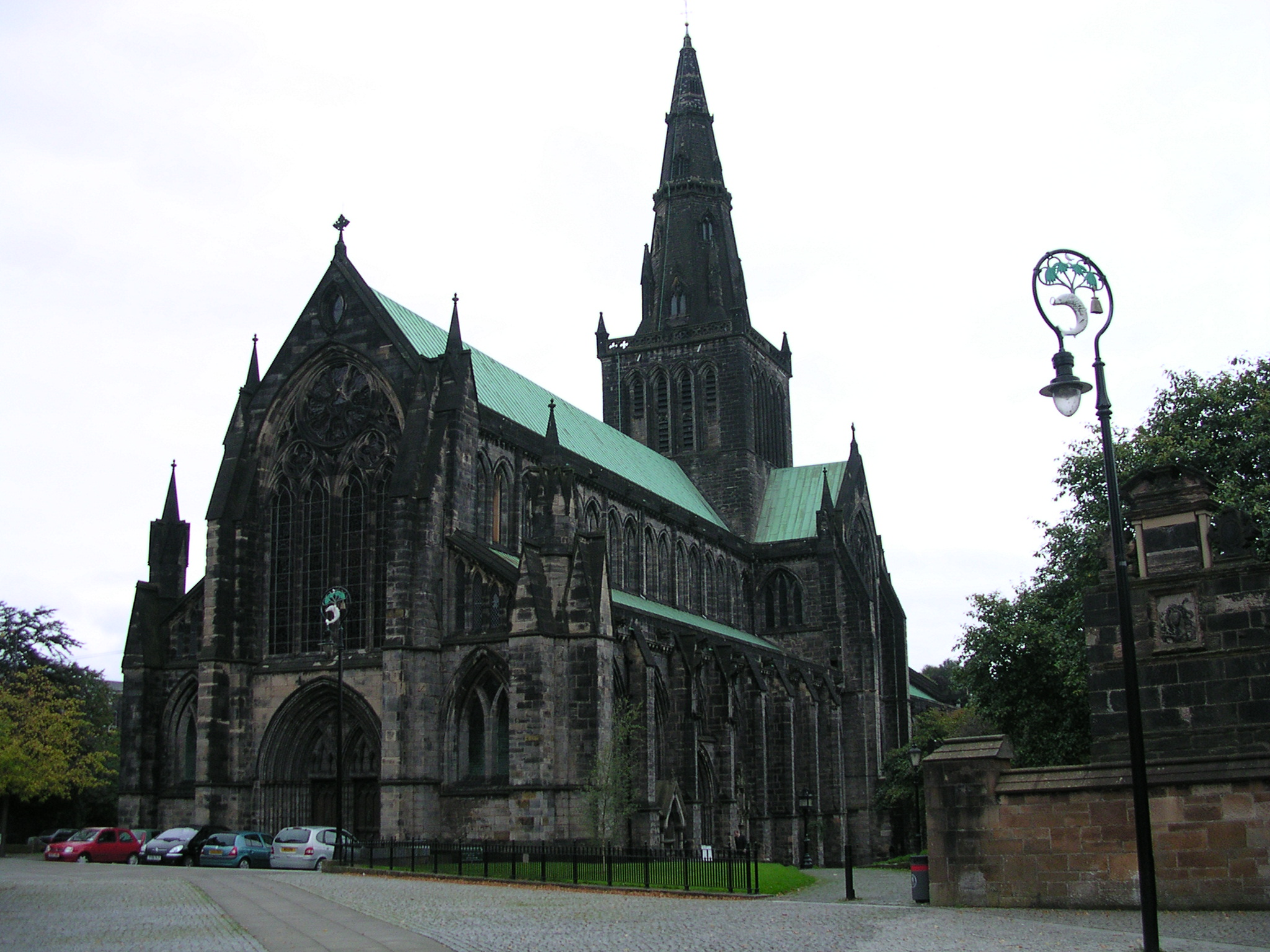 Vista exterior de la Catedral de Glasgow (Escocia, UK)